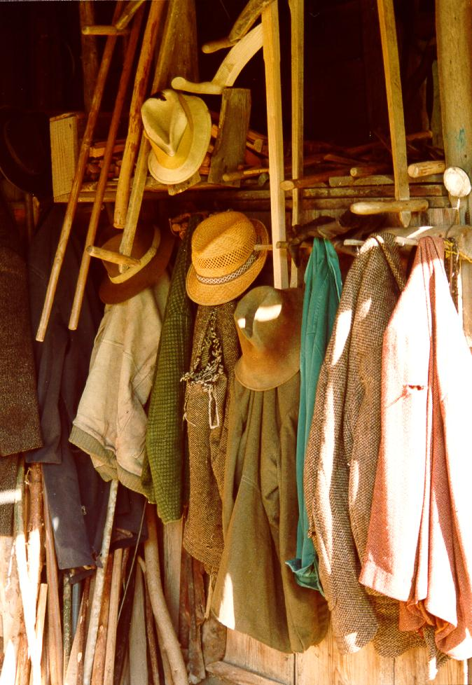 Garderobe